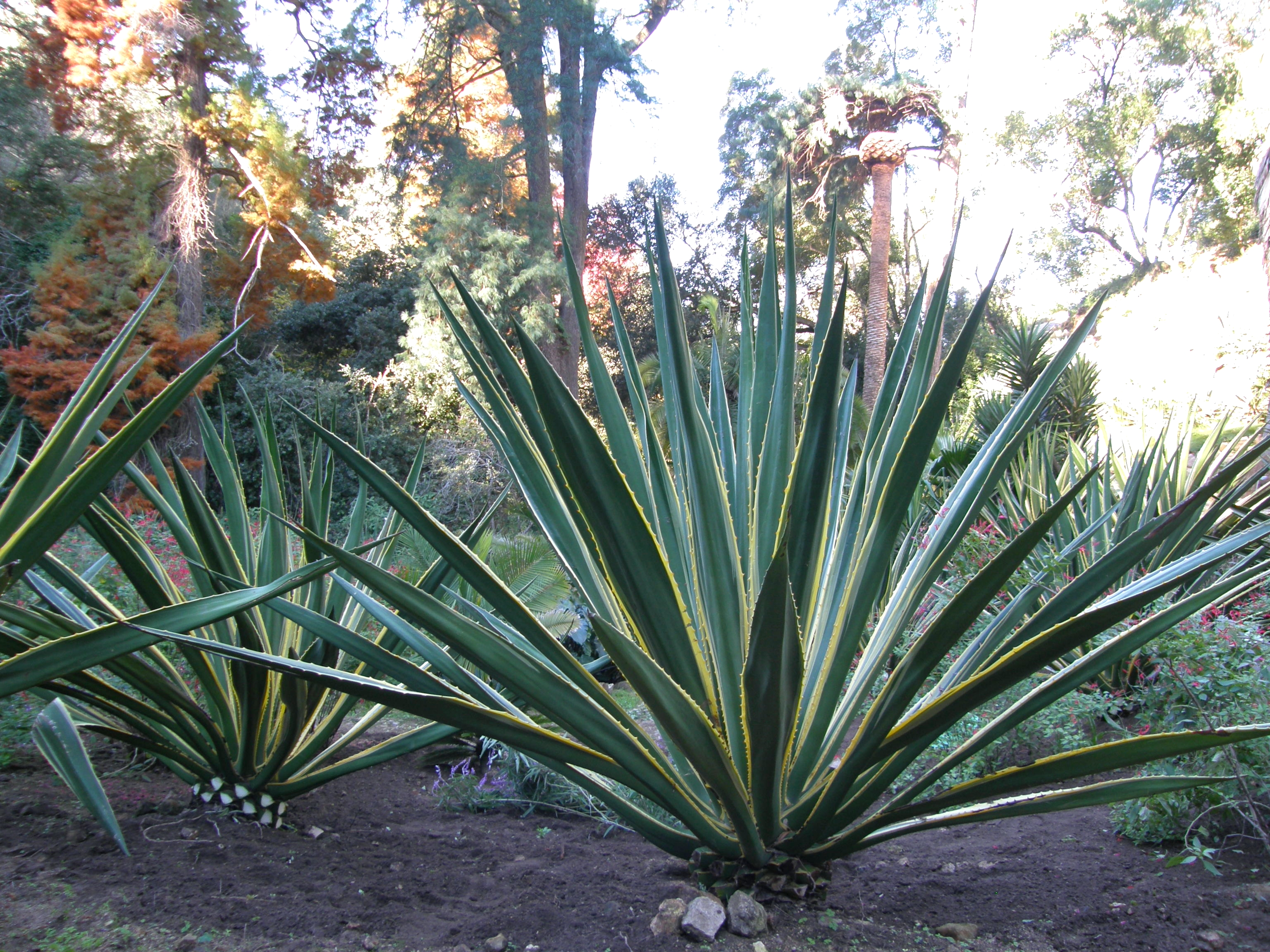 Furcraea selloa K.Koch subs marginata. Parc de Monserrate, Sintra, Portugal